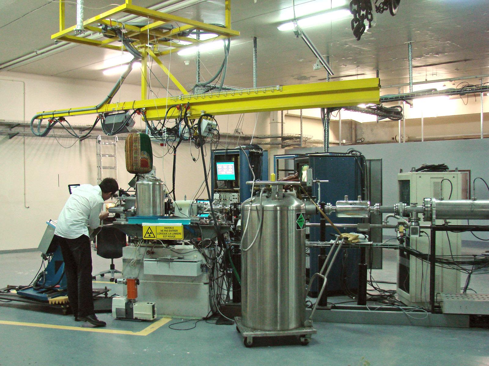 La ligne de faisceau extrait de l'accélérateur d'ions AGLAE au C2RMF. Le C2RMF est le Centre de Recherche et de Restauration des Musées de France. Sa filière consacrée au développement des méthodes d'analyse des biens culturels s'est constituée autour de l'accélérateur de particules AGLAE (acronyme pour Accélérateur Grand Louvre d'Analyse Elémentaire). Elle fait également partie d'une unité mixte de recherche avec le CNRS. Au fil des années, AGLAE est devenu le prototype des instruments d'analyse non destructive, particulièrement bien adapté à l'étude des oeuvres d'art.